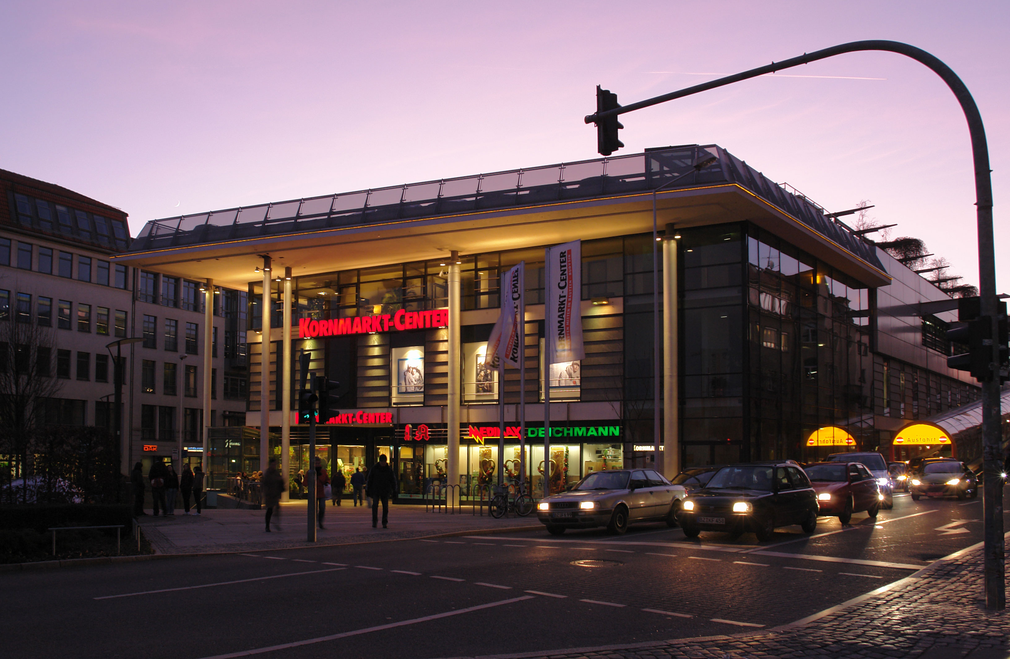 Kornmarktcenter in Bautzen Hornjoserbsce: Žitnowičny center w Budyšinje.